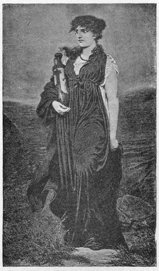 Antigone